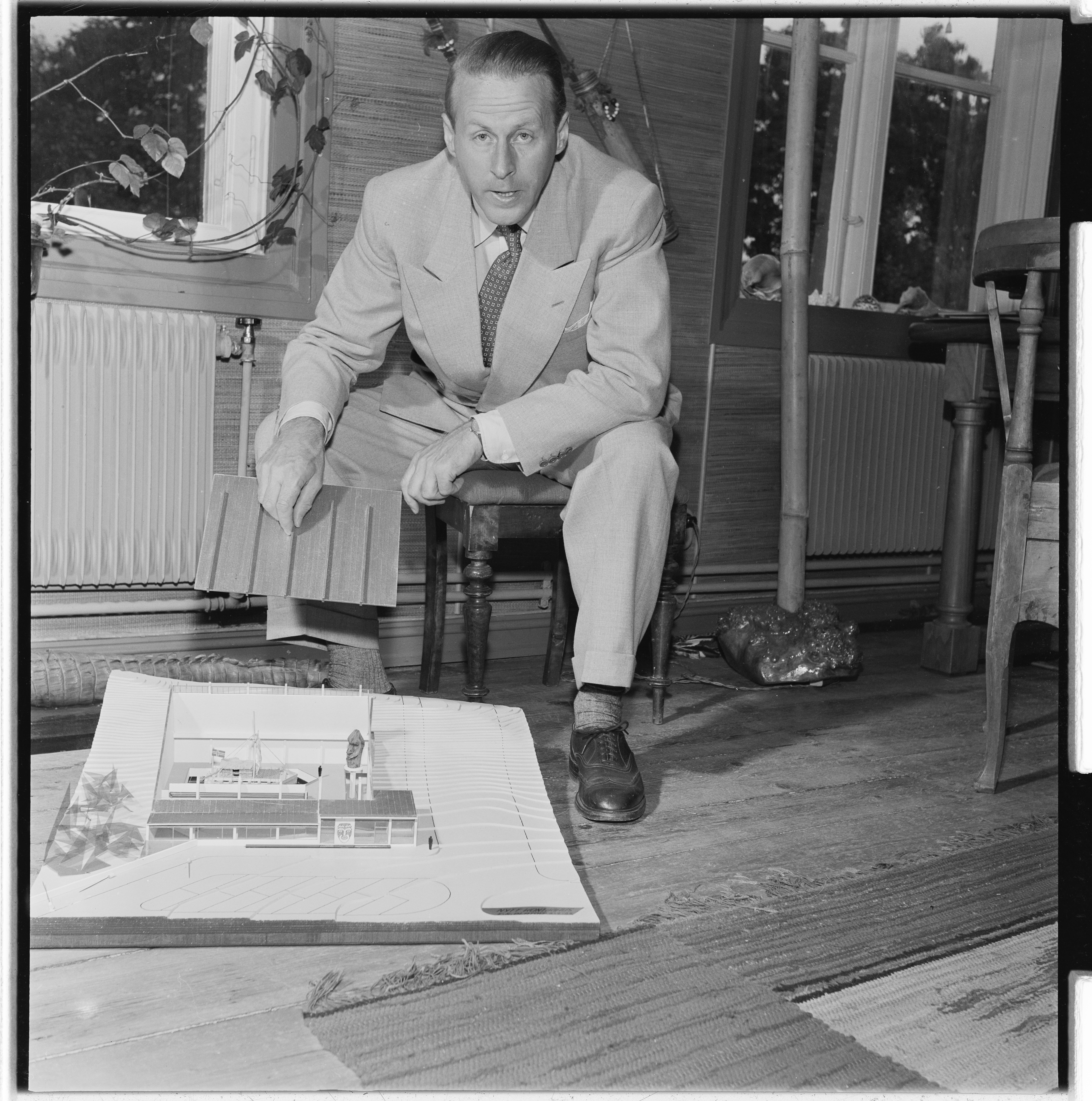 Bildet er hentet fra Arkivverket. Thor Heyerdahl Arkivinstitusjon : Riksarkivet Arkivnavn : Billedbladet NÅ Sted : Norge, Ukjent, Ukjent, Ukjent Emneord: Oppdagere, Kon-Tiki, Menn Avbildet: Heyerdahl, Thor